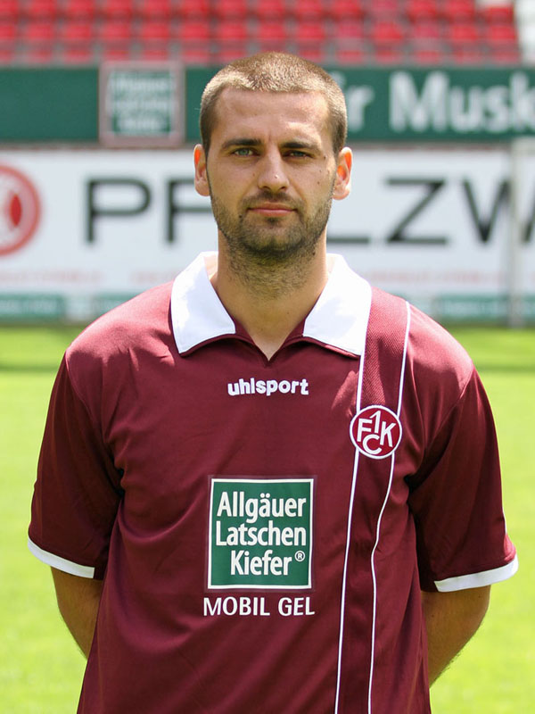 Stiven Rivic, Fußballspieler